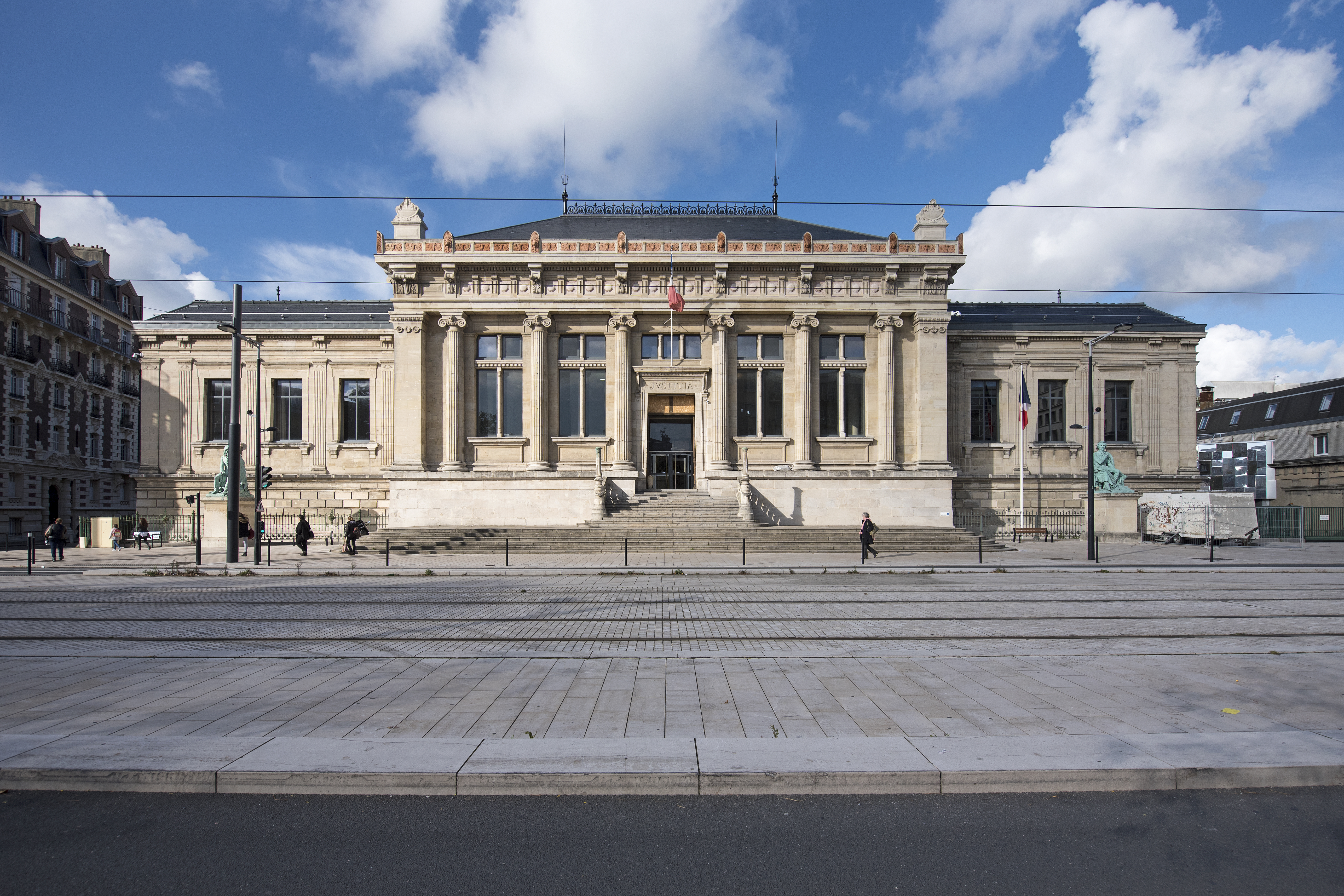 Palais de justice du Havre, septembre 2017.